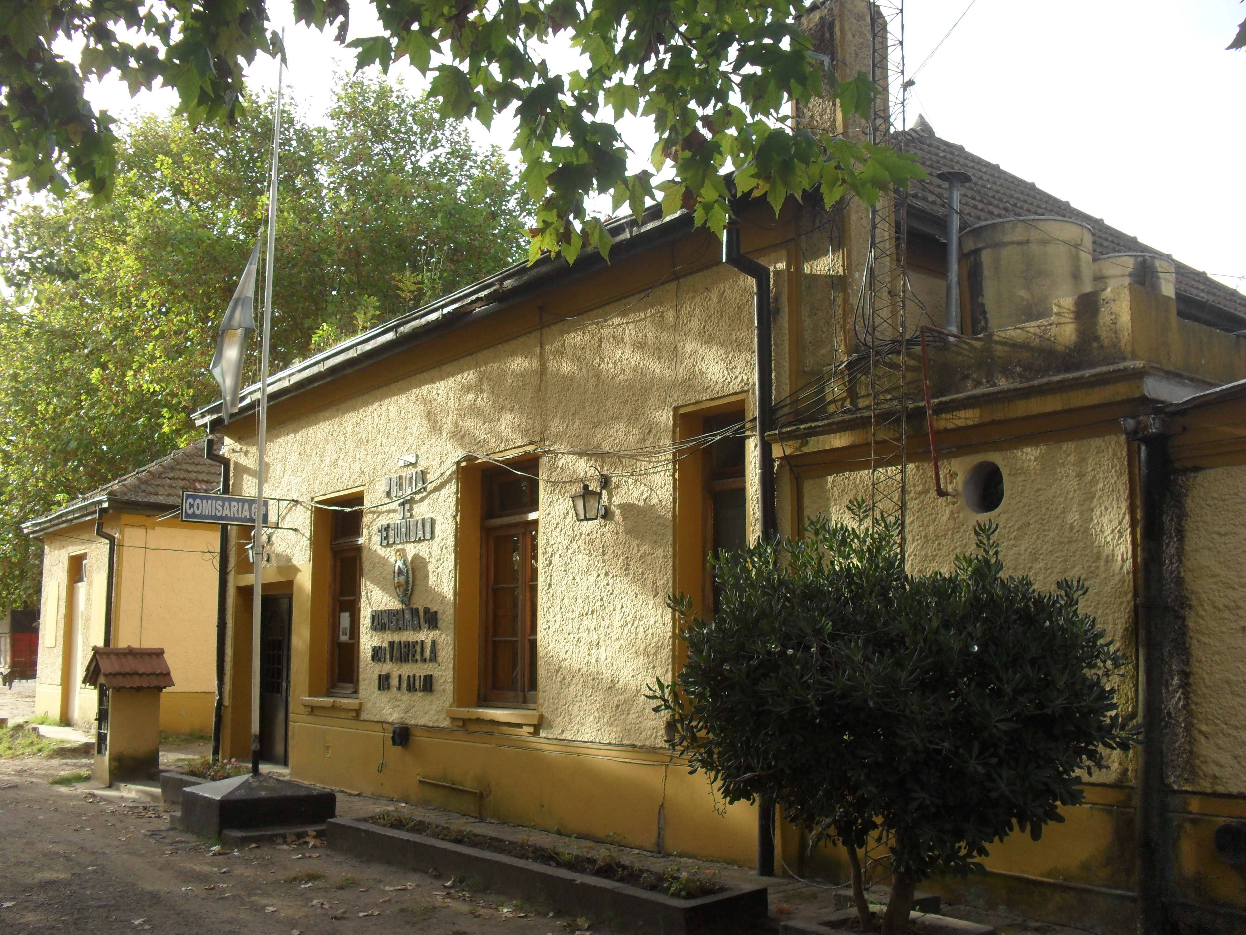 Antigua Estación Ingeniero Allan